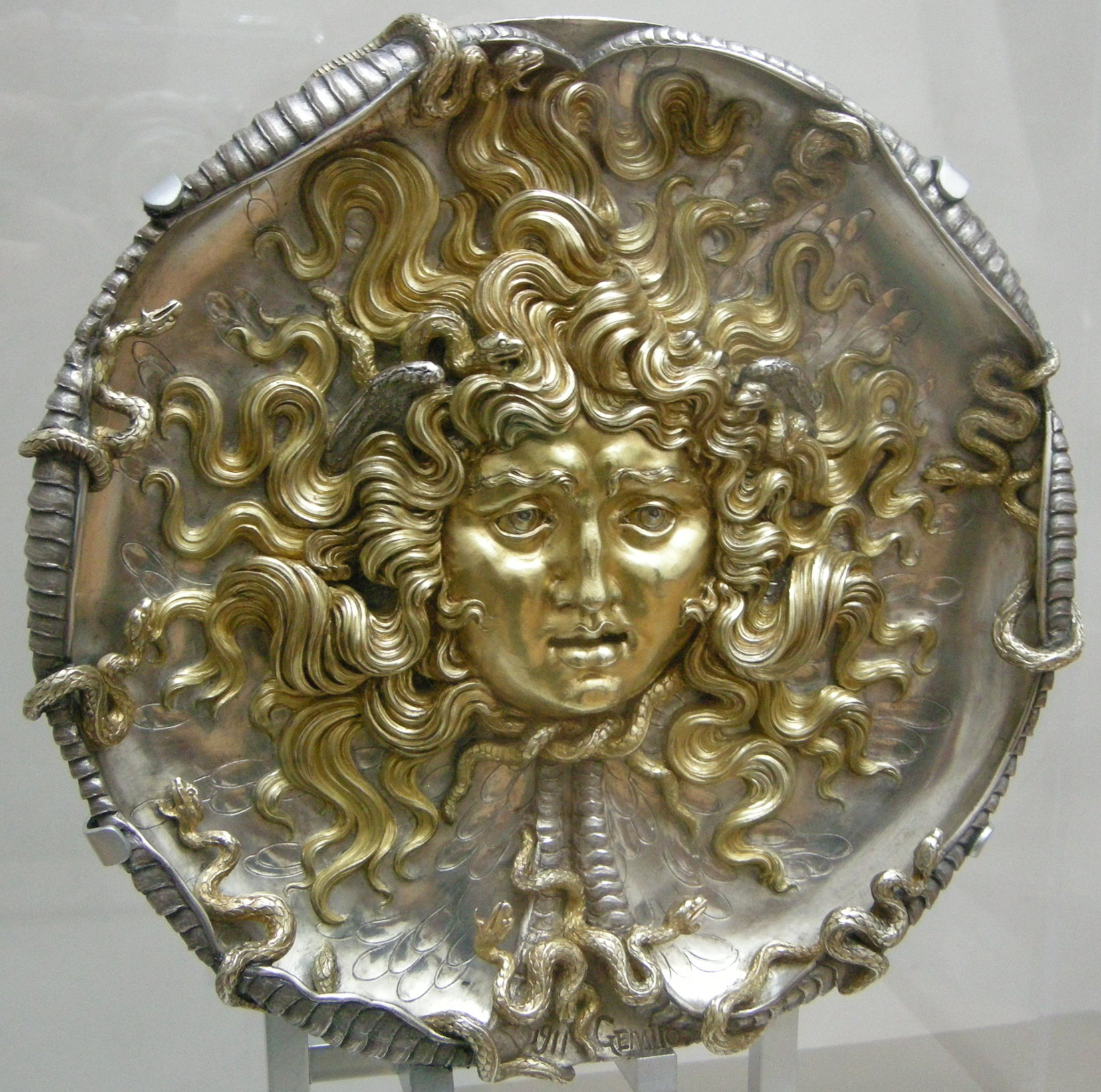 Vincenzo gemito, medusa, 1911